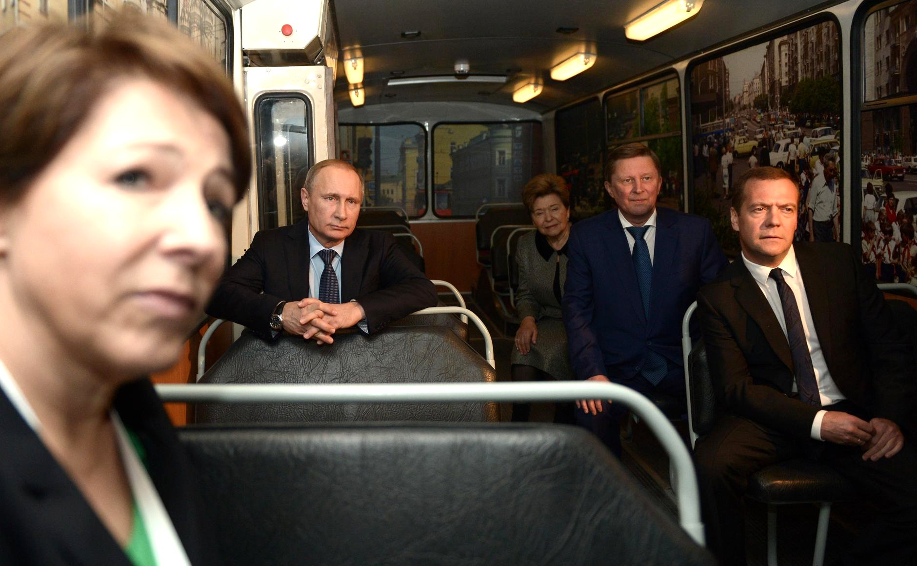 дочь первого президента России Бориса Ельцина Татьяна Юмашева проводит в Ельцин-центре экскурсию для руководства страны, 25.11.2015